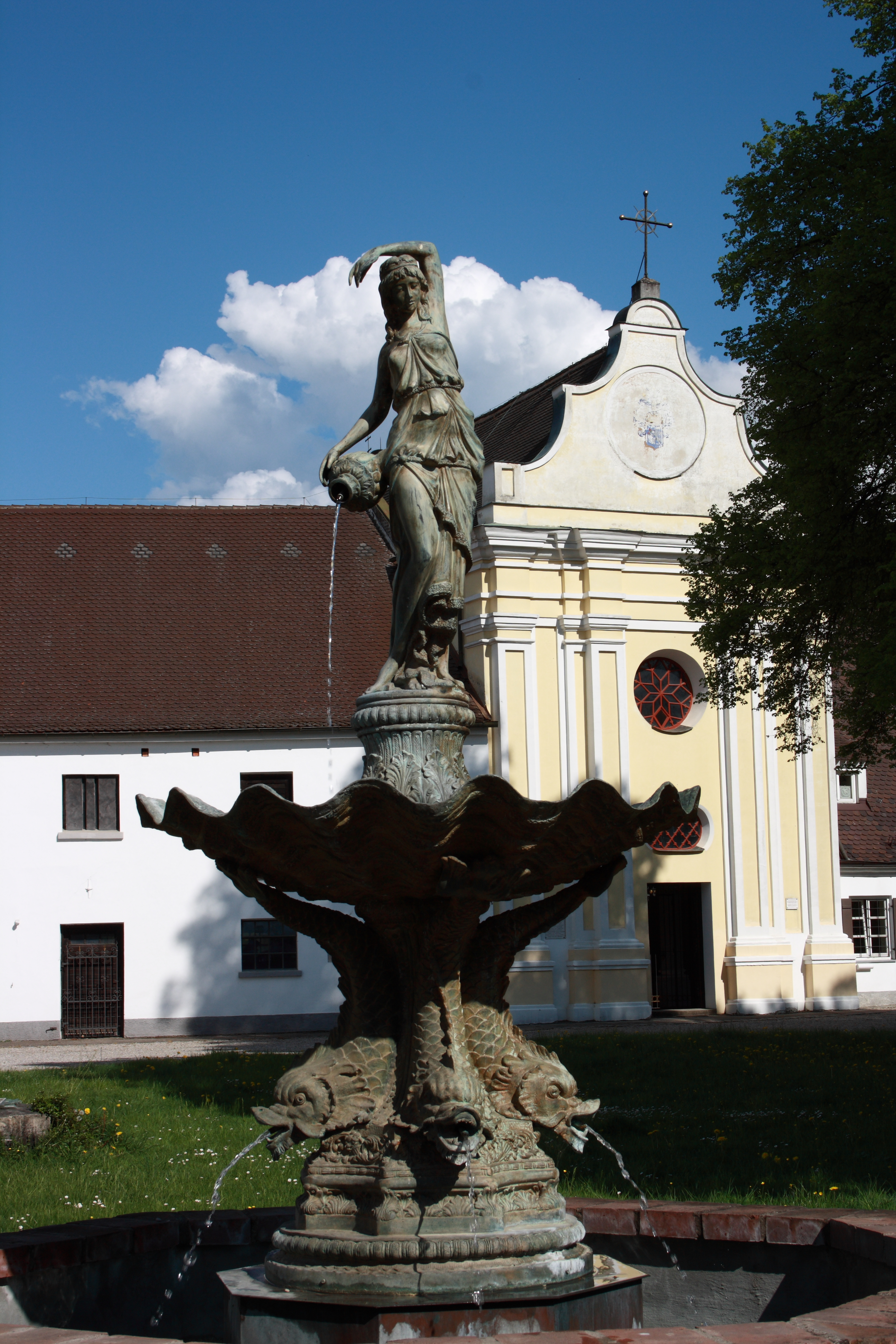 Schloss Scherneck in Rehling, einer Gemeinde im Landkreis Aichach-Friedberg (Bayern)